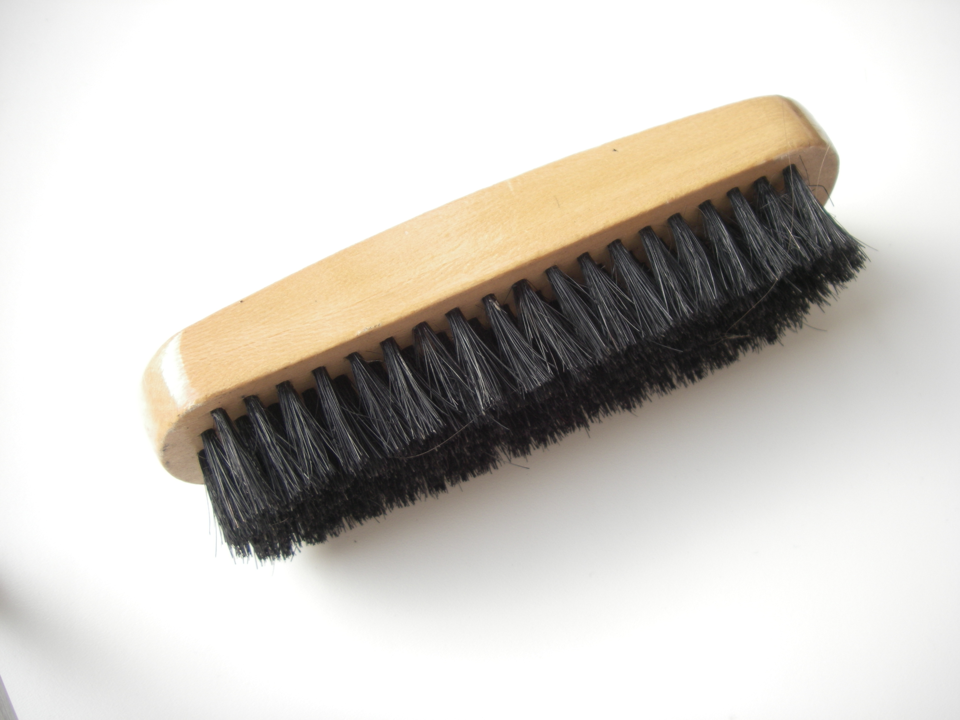 Обувная щётка